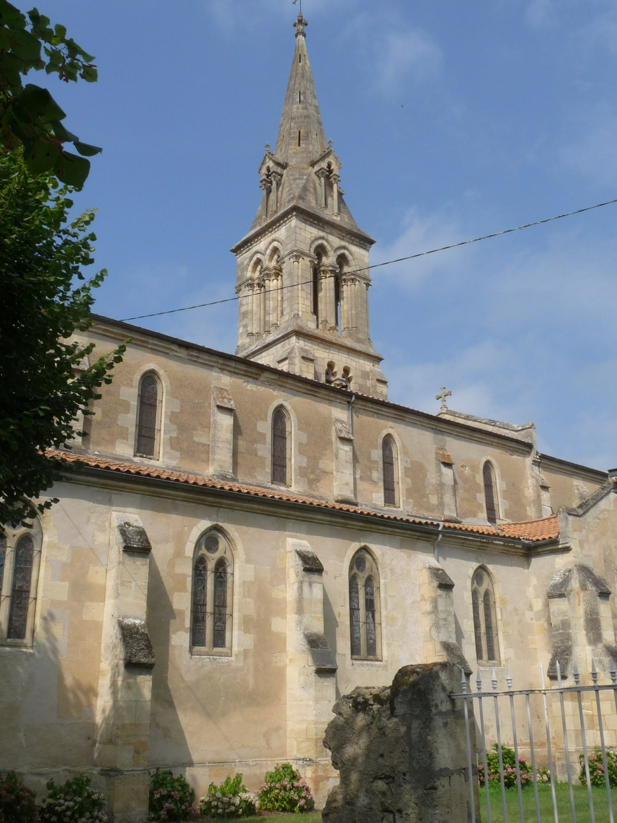 Eglise d'Étauliers,Gironde, France